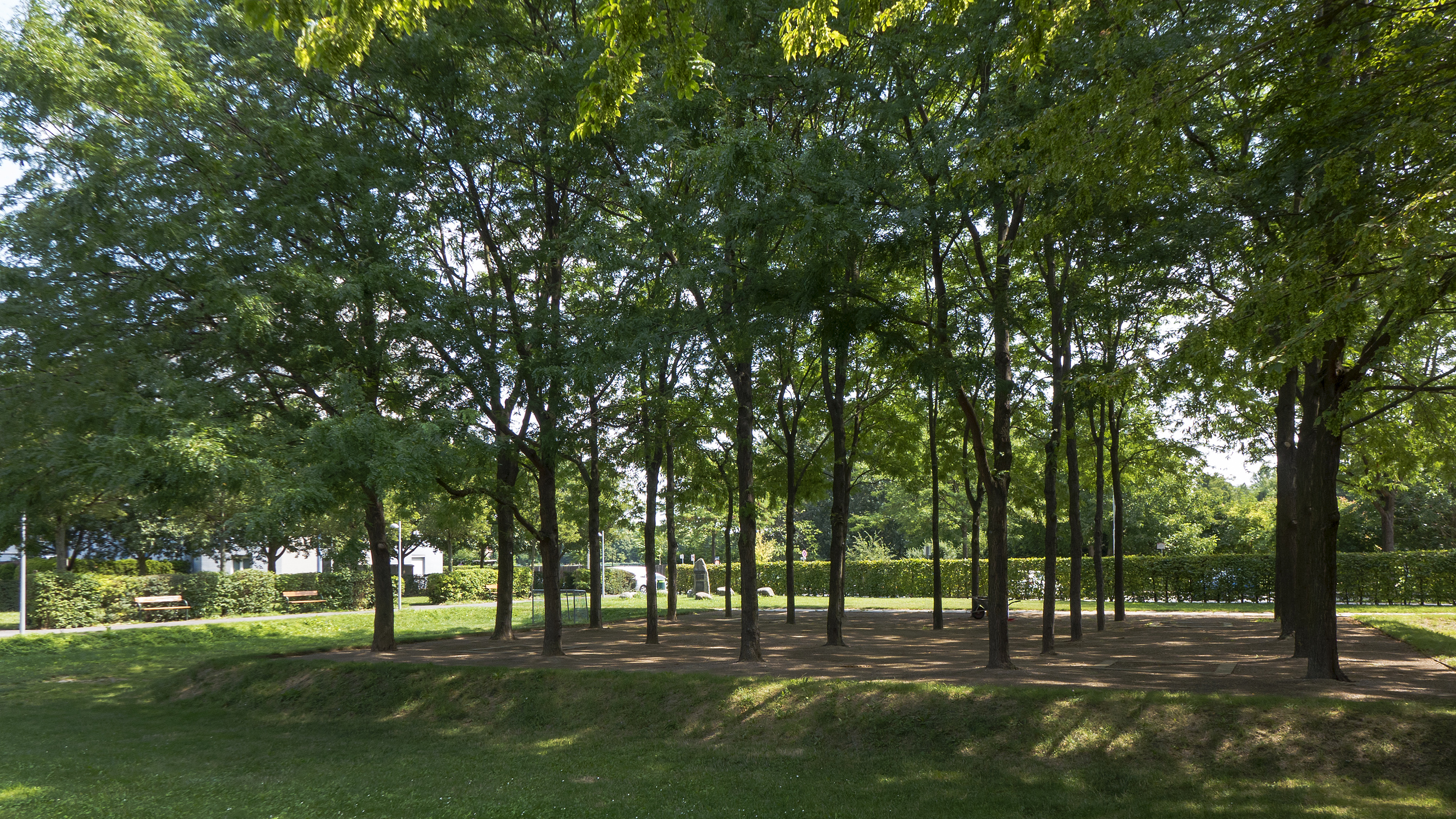 Trygve-Lie-Park in Wien 22